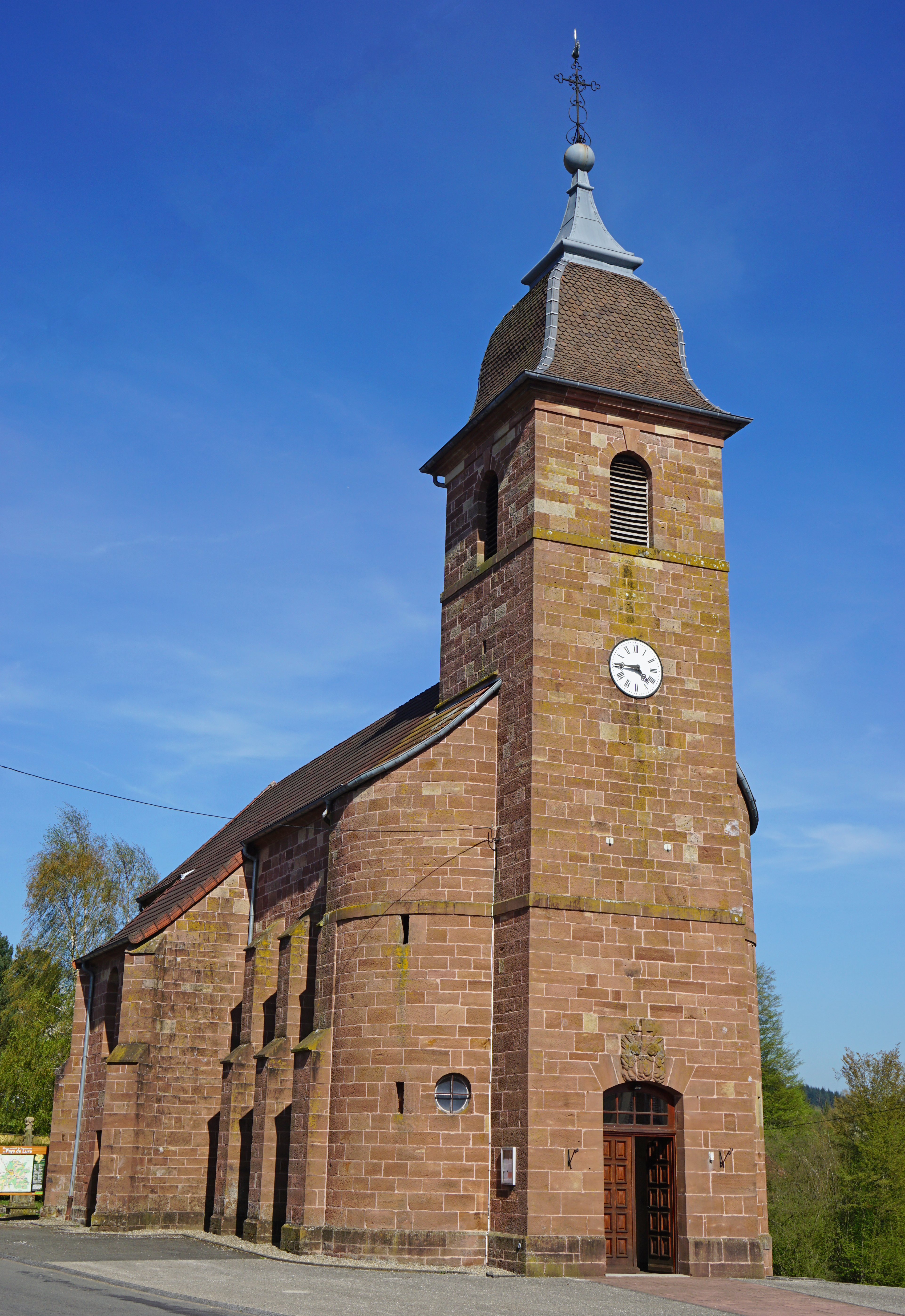 Église Saint-Nicolas de Faymont.